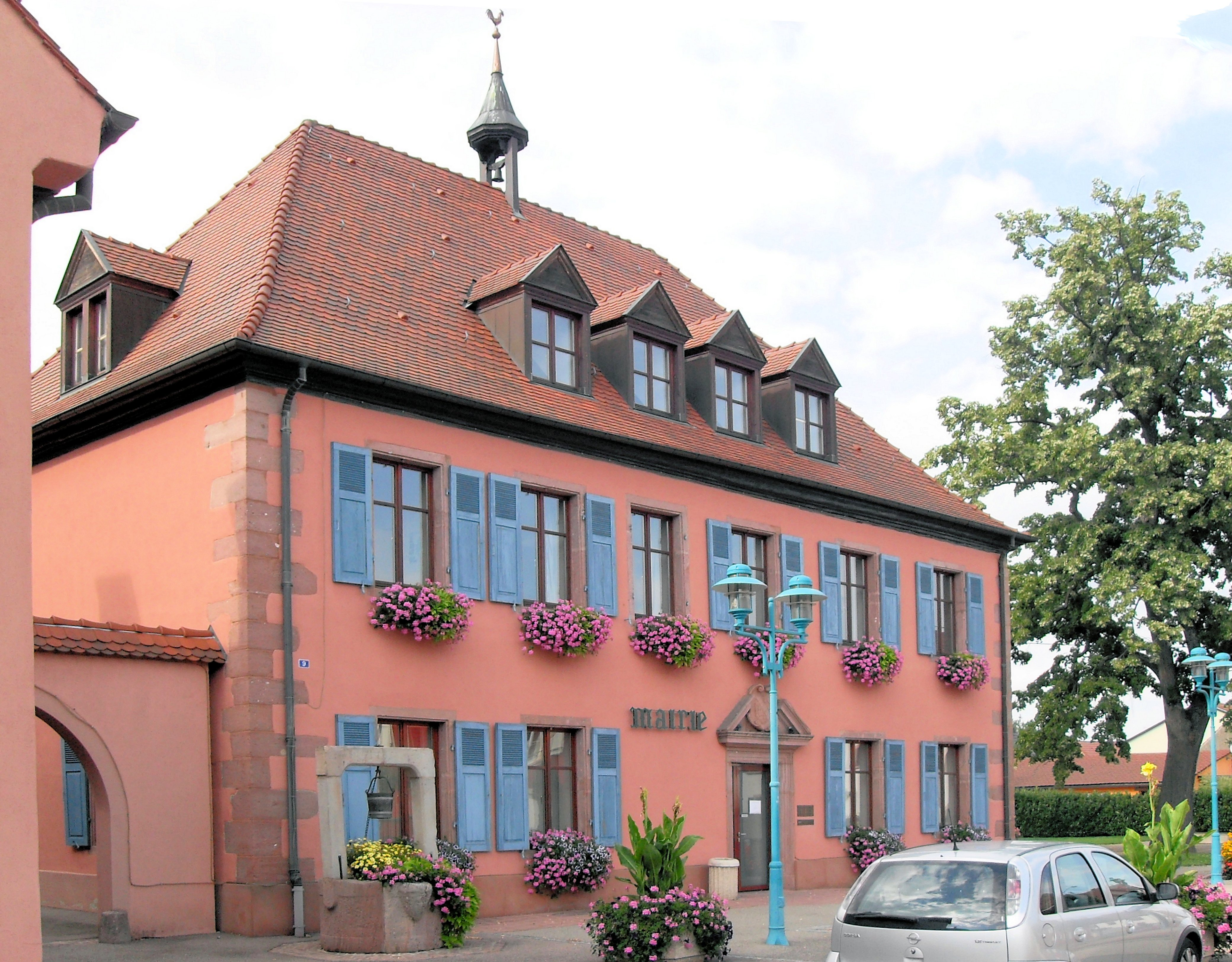 La mairie de Bollwiller